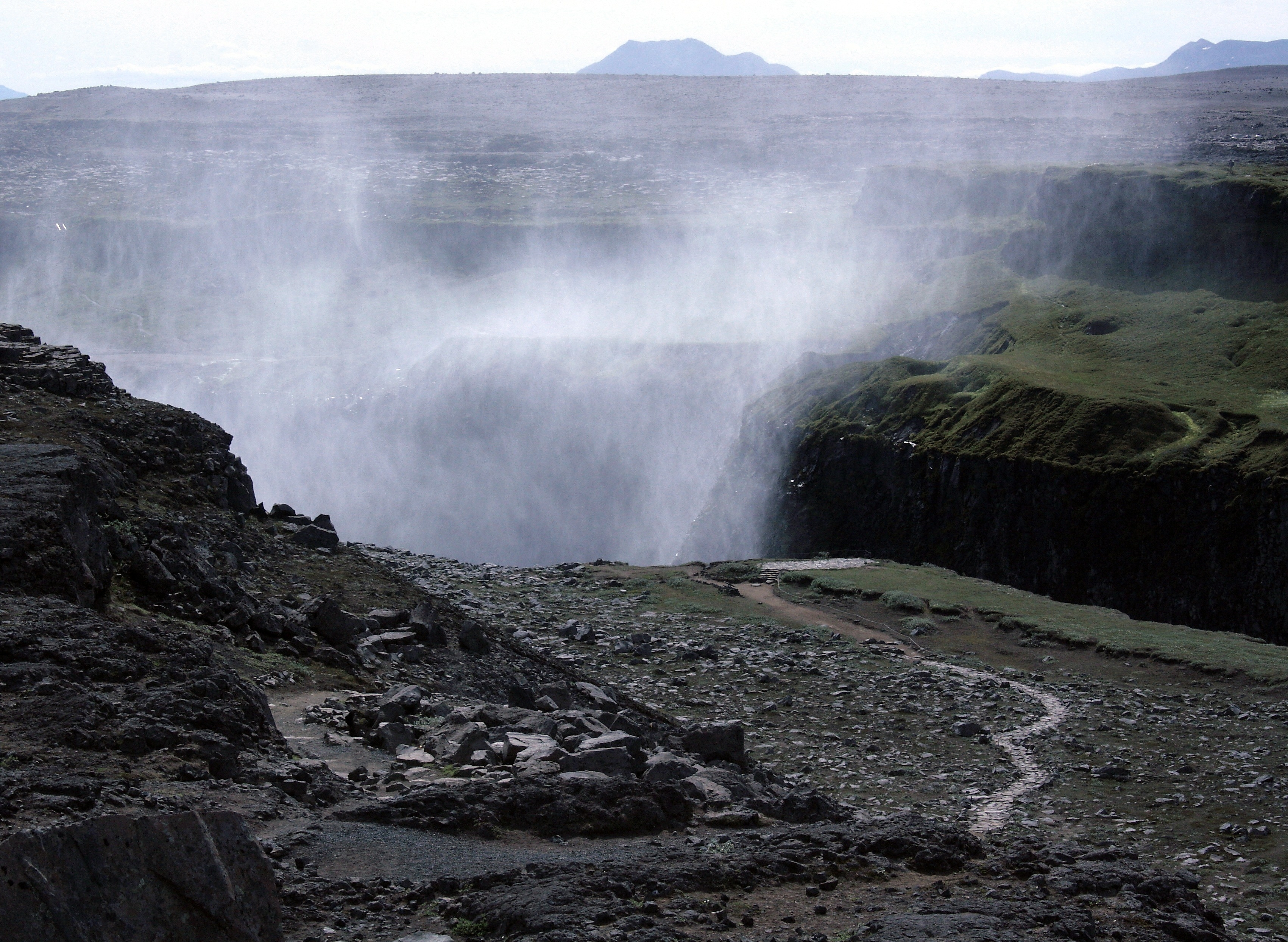 Dettifoss. Blick auf den "Schleier" des Wasserfalls; vom Parkplatz aus gesehen. An der rechten Schleierkante unten befindet sich der Aussichtspunkt auf den Wasserfall.